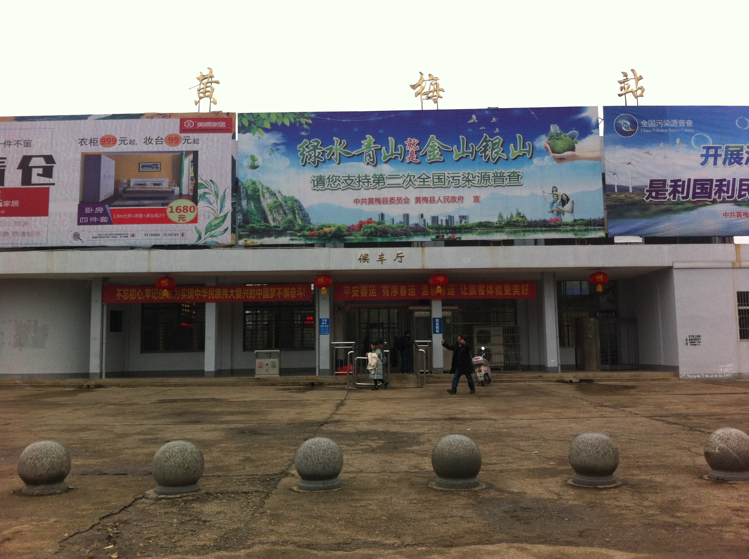 中文（中国大陆）: 黄梅火车站大门，摄于2019年2月